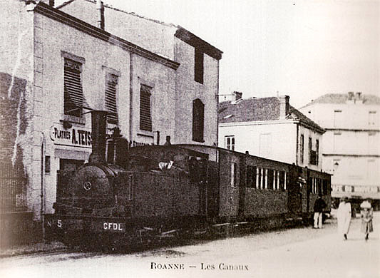 Le tacot au départ du Rond-Point des Canaux